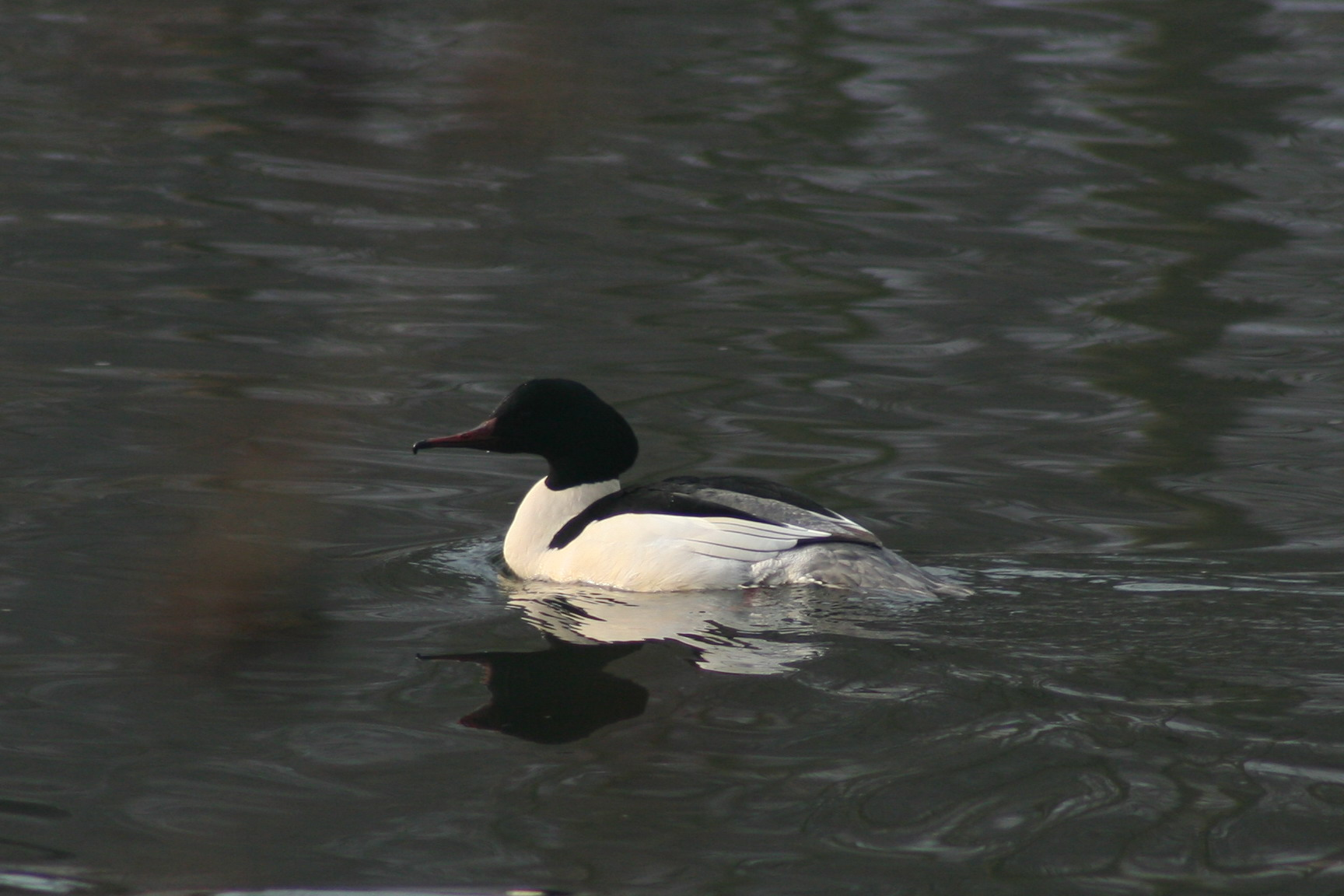 Mergus merganser.